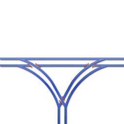 Een schema van een Driehoeksknooppunt, gemaakt door mezelf.